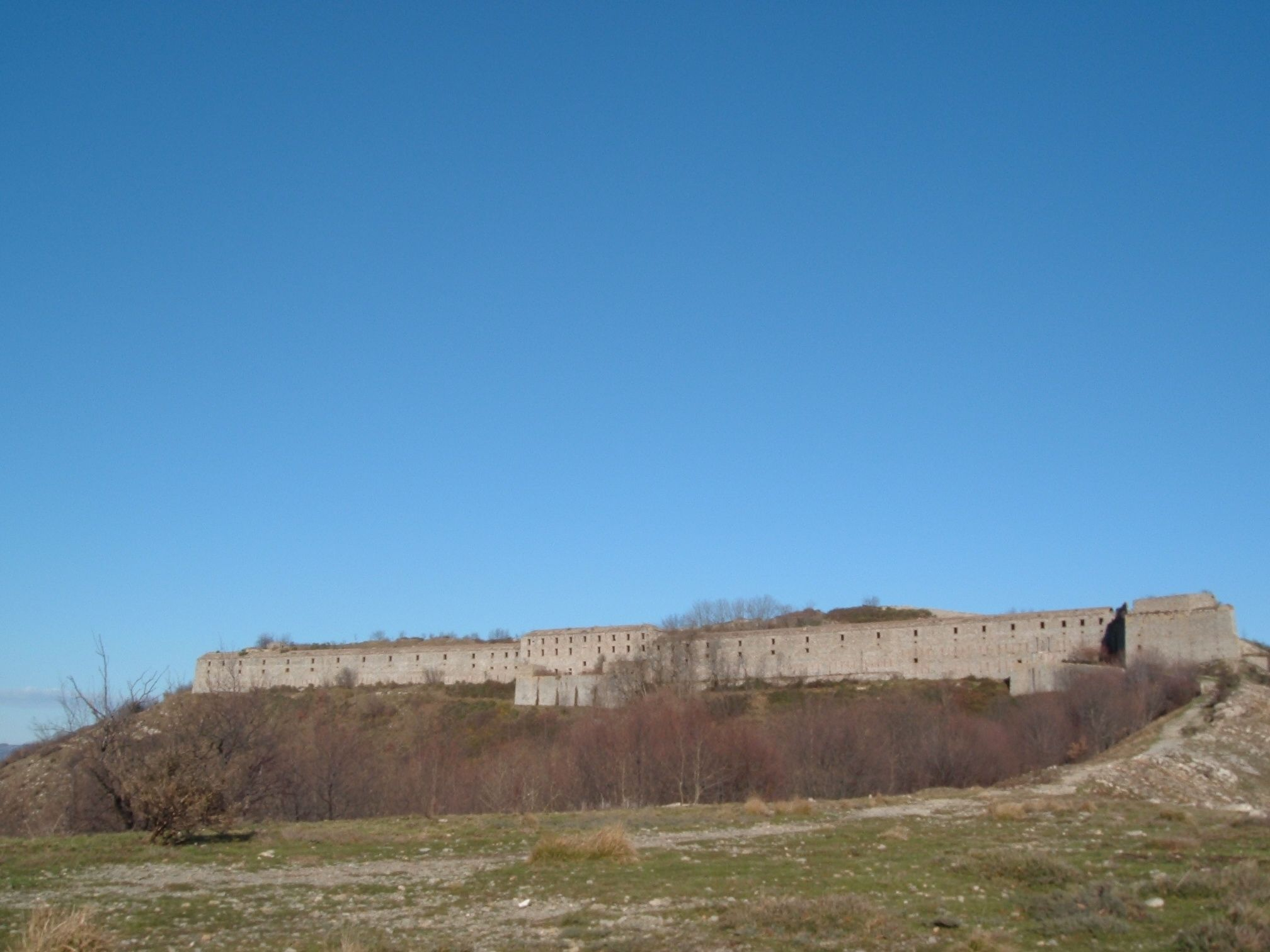 Forte Monteratti. Foto scattata il 2/01/10.